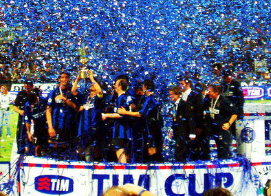 Inter Copa Italia